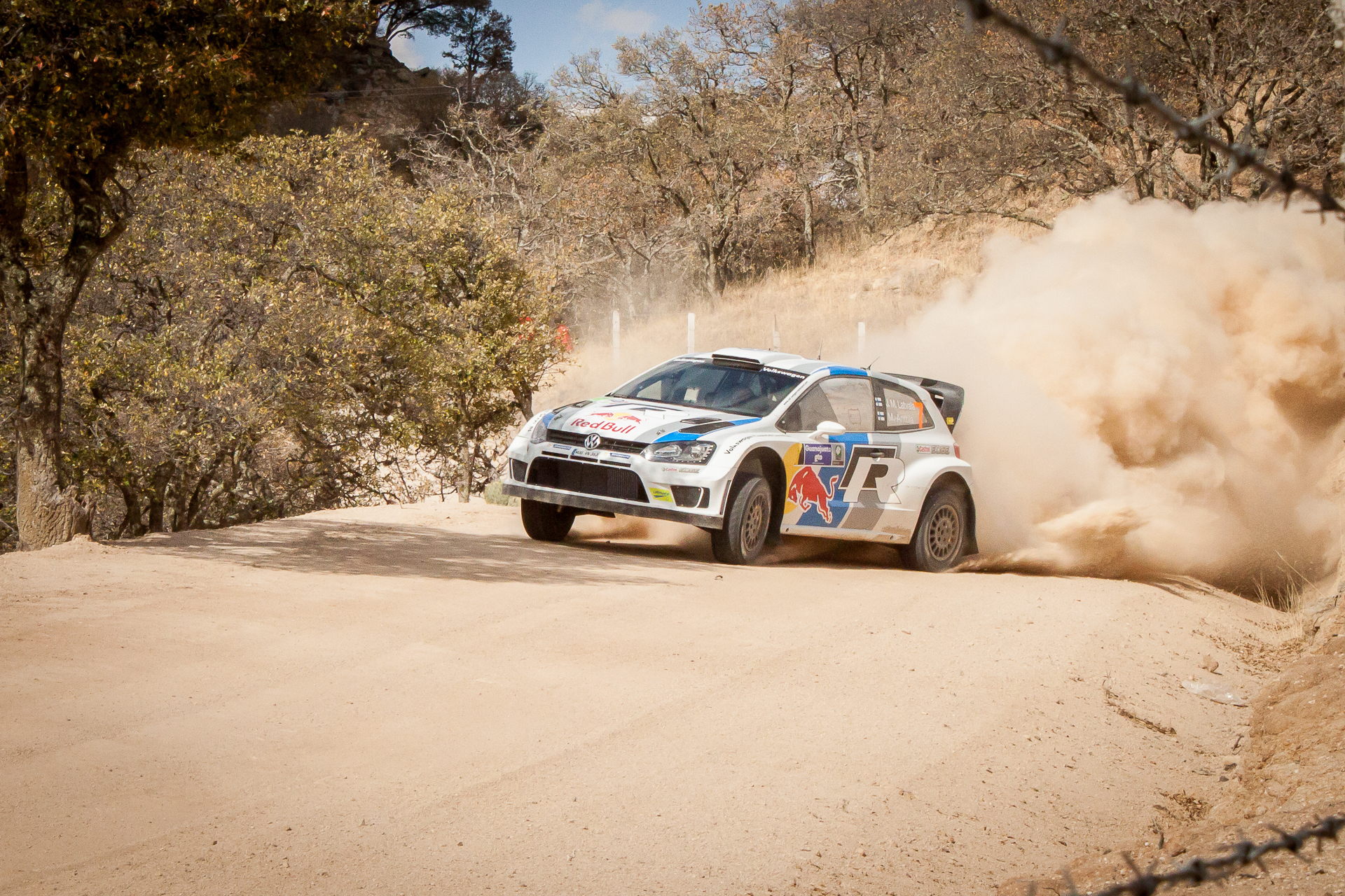 Jari-Matti Latvala podczas Rajdu Meksyku 2013